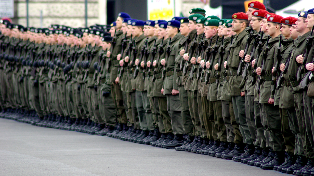 Verschiedene Barettfarben des Bundshheres bei einer Angelobung zum Nationalfeiertag am Heldenplatz, 26. Oktober 2008